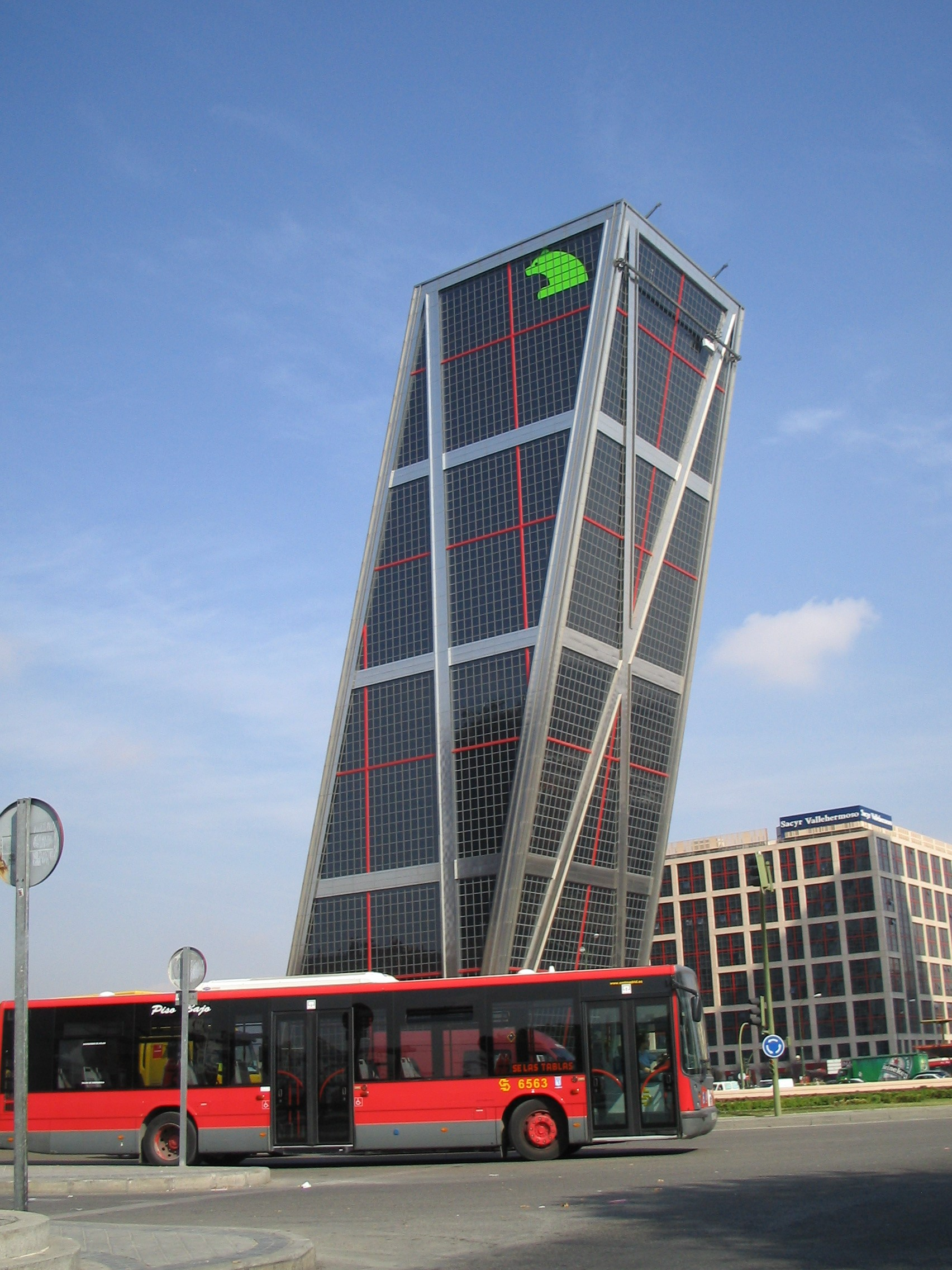 Torre Kio oeste de las Torres Kio.